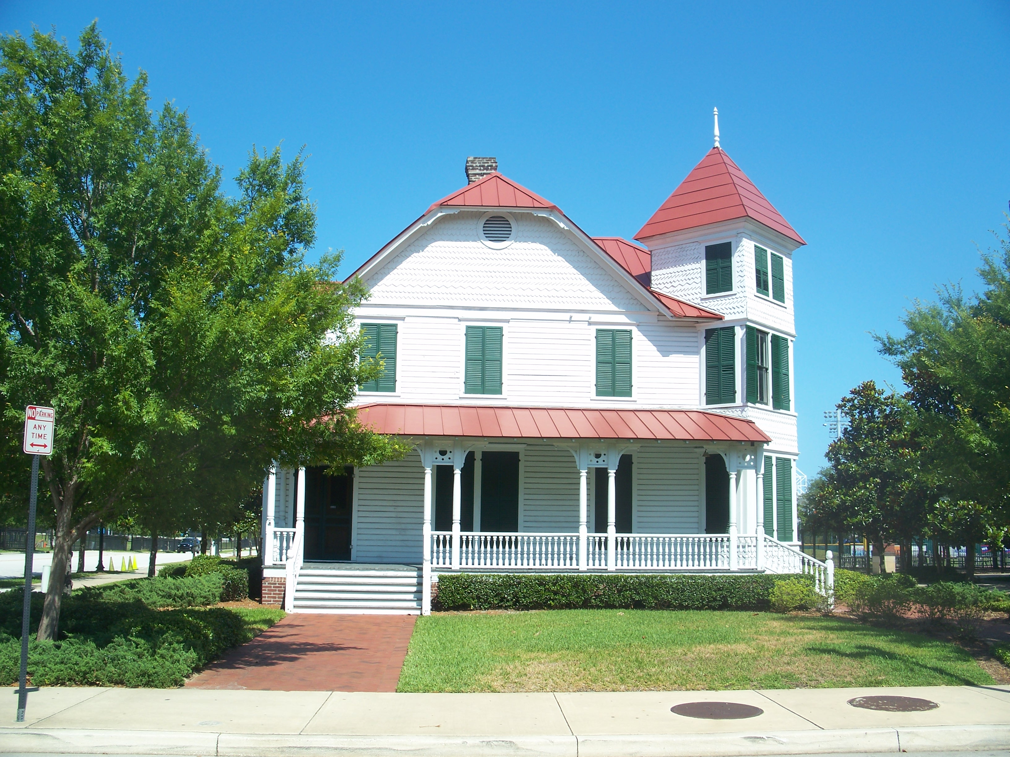 Jacksonville, Florida: Merrill House museum